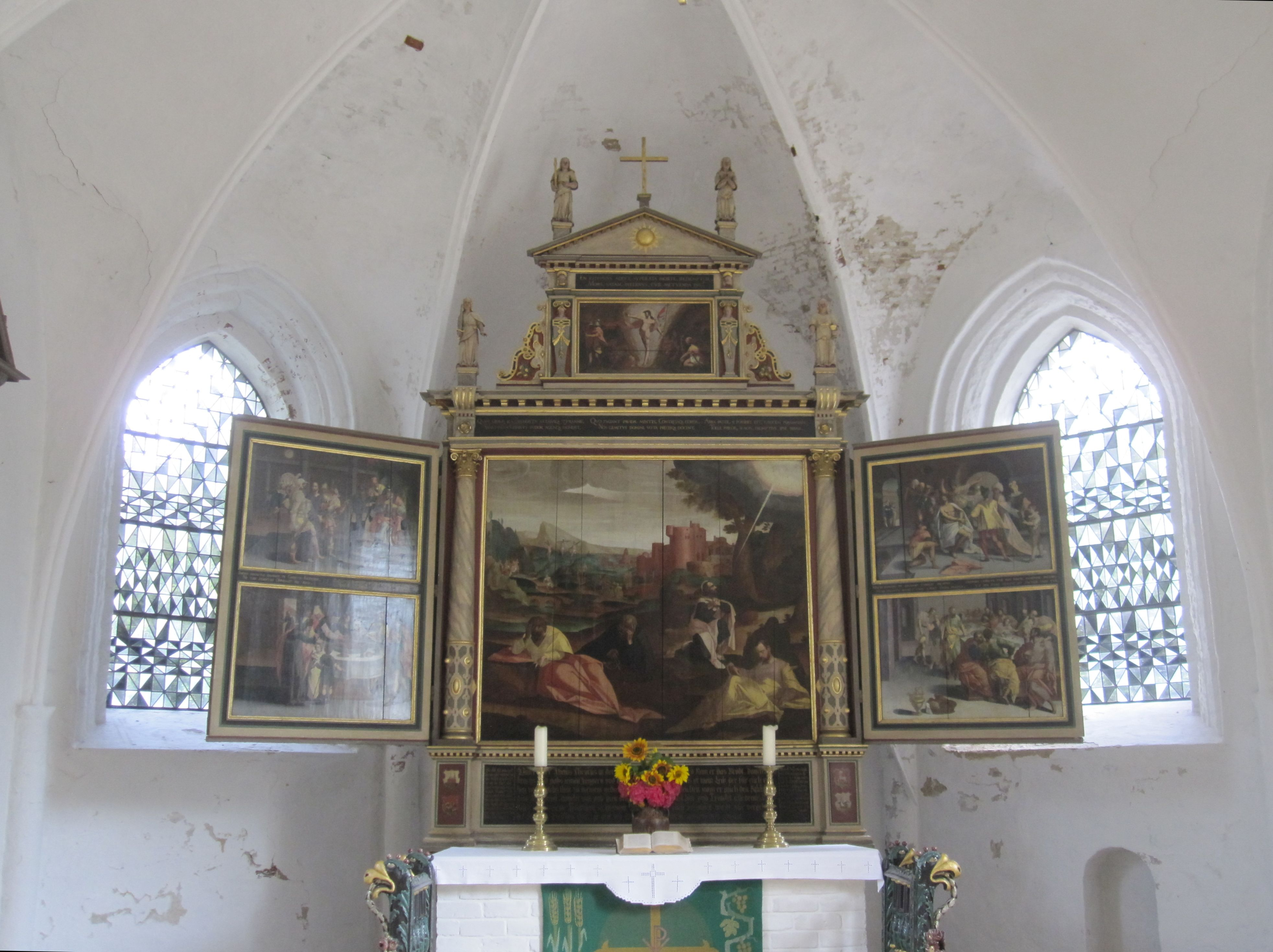 Die St.-Christians-/St.-Bartholomäus-Kirche steht in Gardings Ortsmitte auf einer elf Meter hohen Warft, der höchsten Erhebung Eiderstedts. Der Kirchturm ist noch heute der höchste Punkt Eiderstedts und diente lange als Seezeichen. Mit ihrem gotischen Orgelprospekt von 1512 hat die Kirche den ältesten Orgelprospekt Nordeuropas. Das ehemals gotische hohe, spitze Dach der Kirche wurde bei einer Renovierung 1854 durch ein besser in die Landschaft passendes und vor allem weniger windanfälliges, niedrigeres Dach ersetzt . Die Kirche geht auf die 1117 errichtete einschiffige, kreuzförmige Backsteinkirche St. Christian zurück. Sie war ursprünglich den Heiligen Maria Magdalena, Christian und Bartholomäus geweiht. Die Kirche wurde im Zeitraum von 1483 bis 1488 zu einer zweischiffigen gotischen Hallenkirche umgebaut, wobei ein Schiff den männlichen und ein Schiff den weiblichen Gottesdienstbesuchern diente. Nachdem Hermann Tast 1524 noch auf dem Marktplatz die erste Reformationspredigt Eiderstedts gehalten hatte, setzte sich die Reformation durch Christian III. von Dänemark bis 1527 in der Region durch. Sichtbar ist dies in der Kirche an der zerschlagenen Altarplatte mit der Aufschrift „Hic sunt reliquiae reconditae“ (Hier sind die Reliquien aufbewahrt). Altar im Chorraum. Der dreiflügelige Gemäldealtar ist ein Werk des niederländisch-tönning‘schen Malers Marten van Achten, der später Hofmaler am Schloss Gottorf in Schleswig wurde. Dieser Altar gilt als Hauptwerk des Manierismus in Schleswig-Holstein.